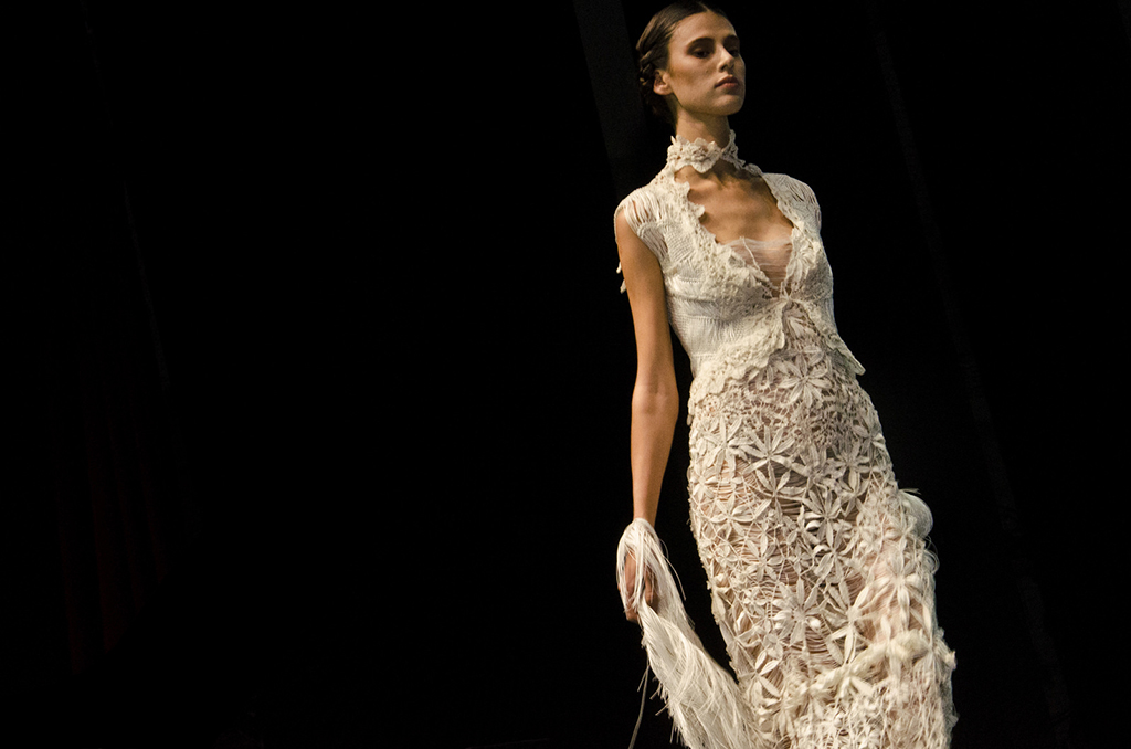 Desfile de Marcia Ganem no MICSUL – 1º Mercado das Industrias Culturais do Mercosul. Foto: Thiago Esperandio/Ministério da Cultura